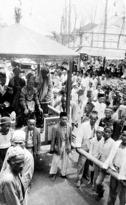 Repronegatief. Een vorstelijk bruidspaar in een draagstoel te Sanggau, Borneo